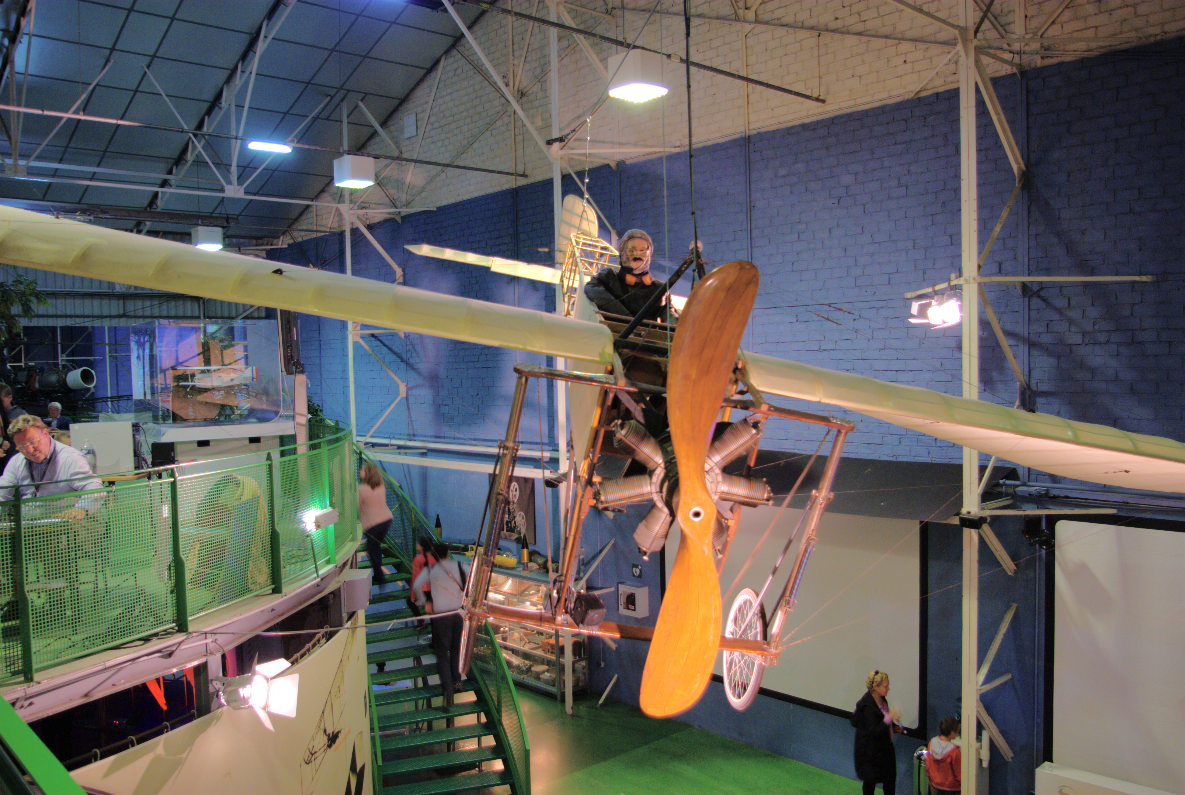 Blériot XI exposé dans le musée Safran.